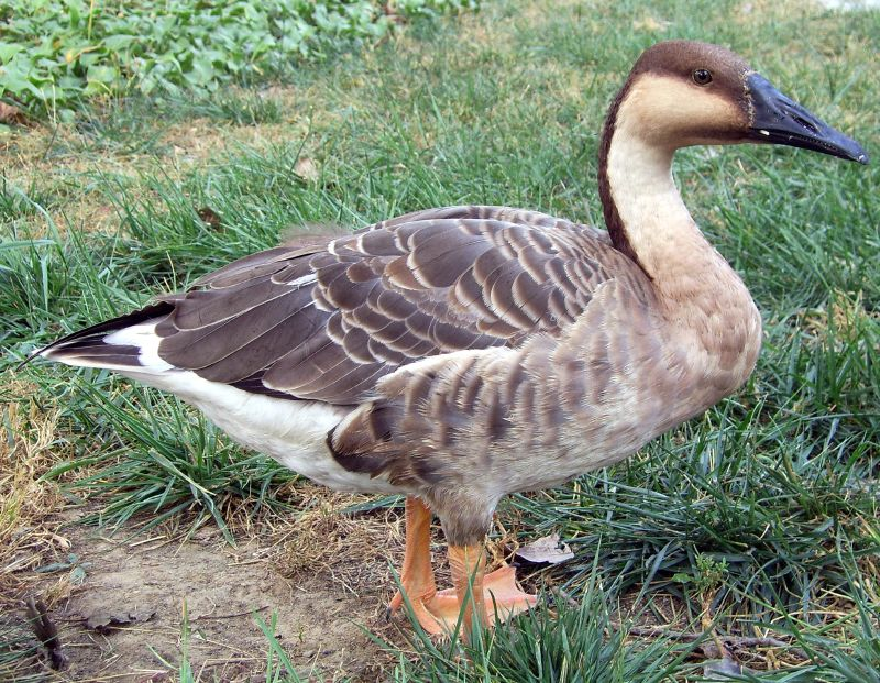 鸿雁; Anser cygnoides Bân-lâm-gú: iá-gô (Anser cygnoides). 野鵝